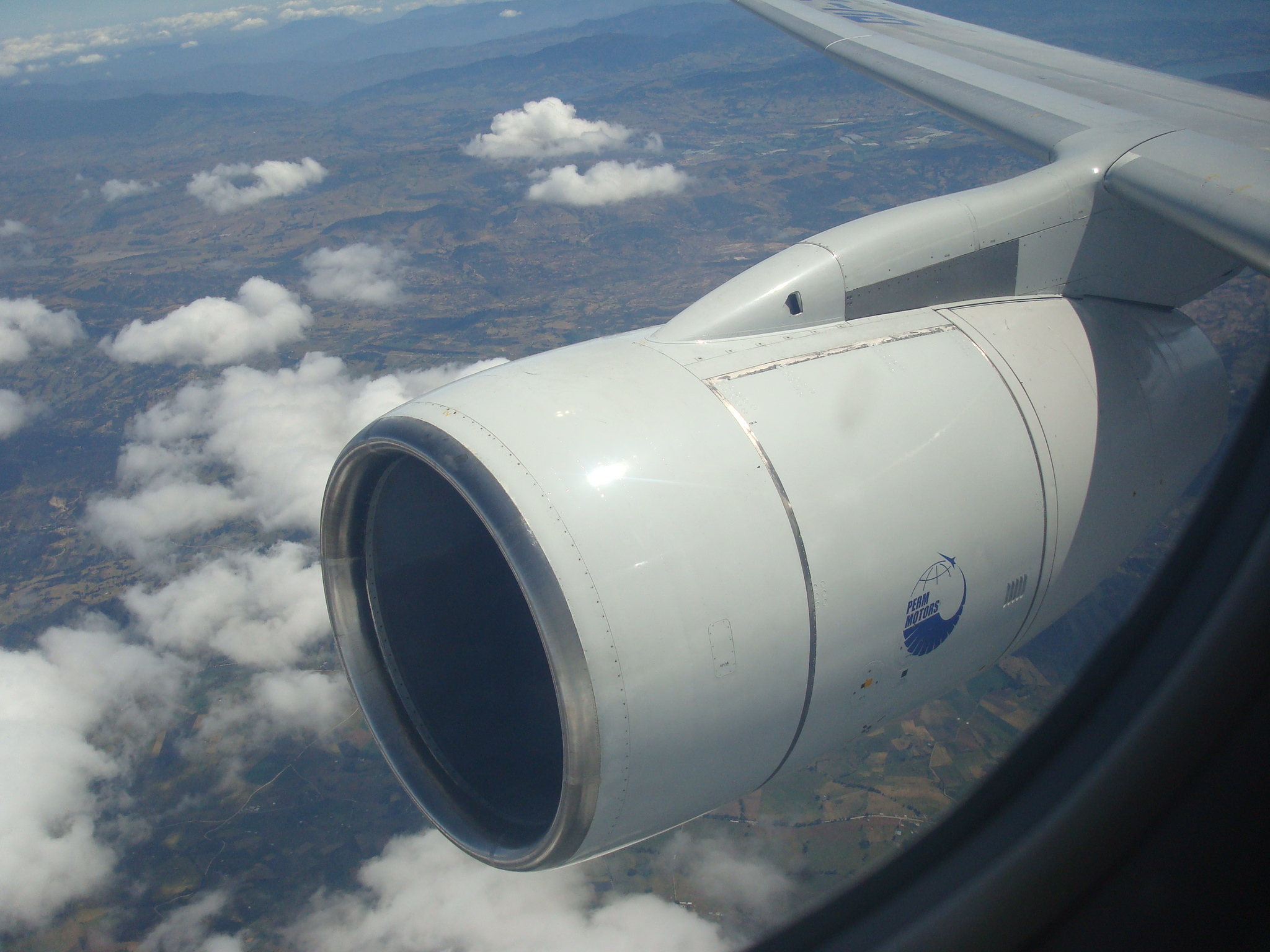 TU-204 Cubana de aviacion, Colombia